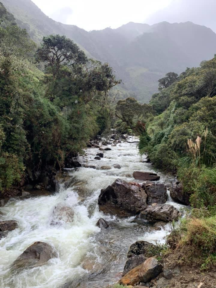 El cerro Fasayñan es un volcán inactivo considerado sagrado por la cultura cañari. Esta ubicado a 30 km del centro de Chordeleg